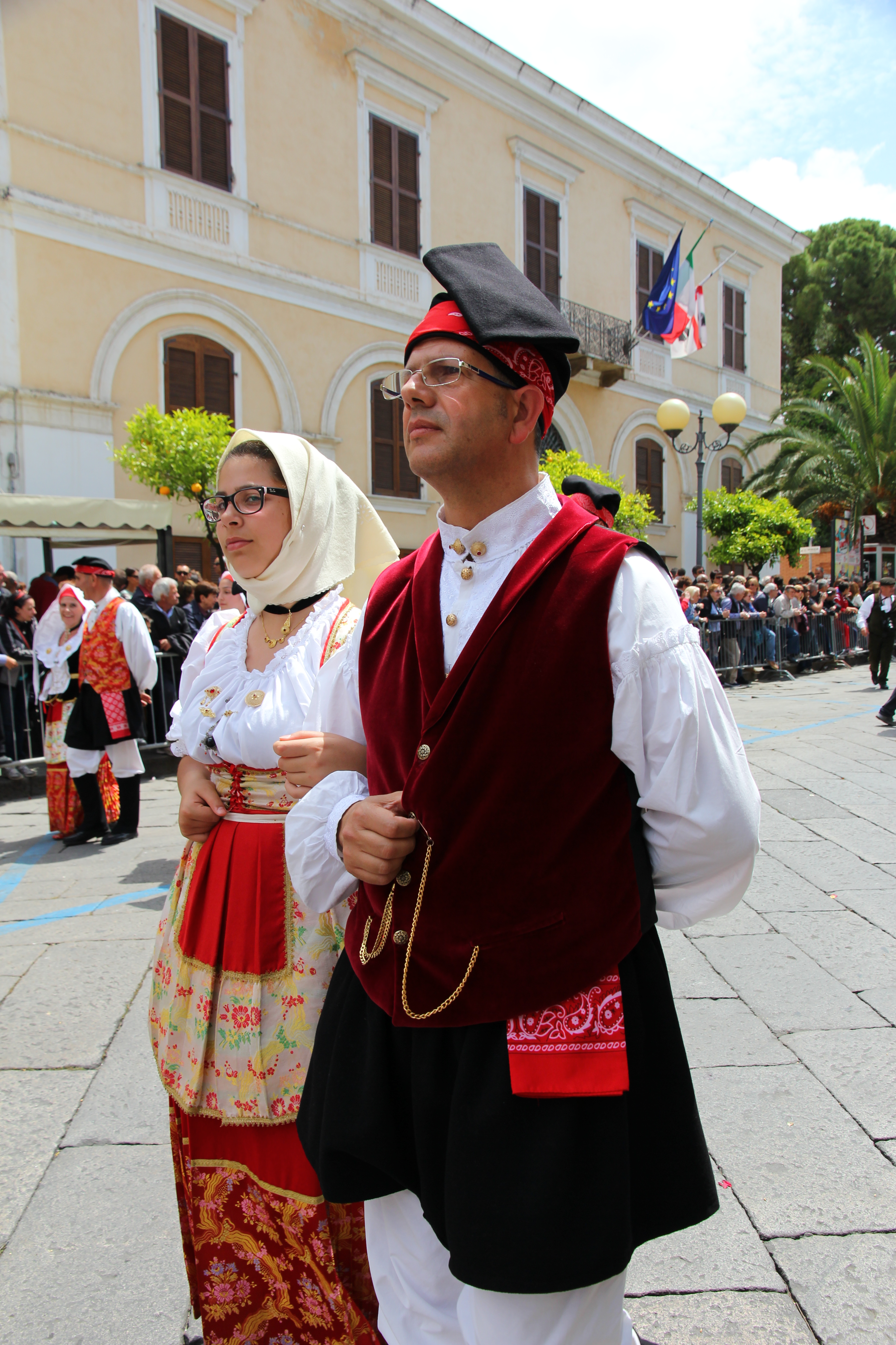 Costume tradizionale